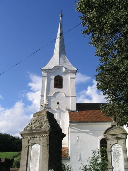 Bibarcfalvi református templom, 2005